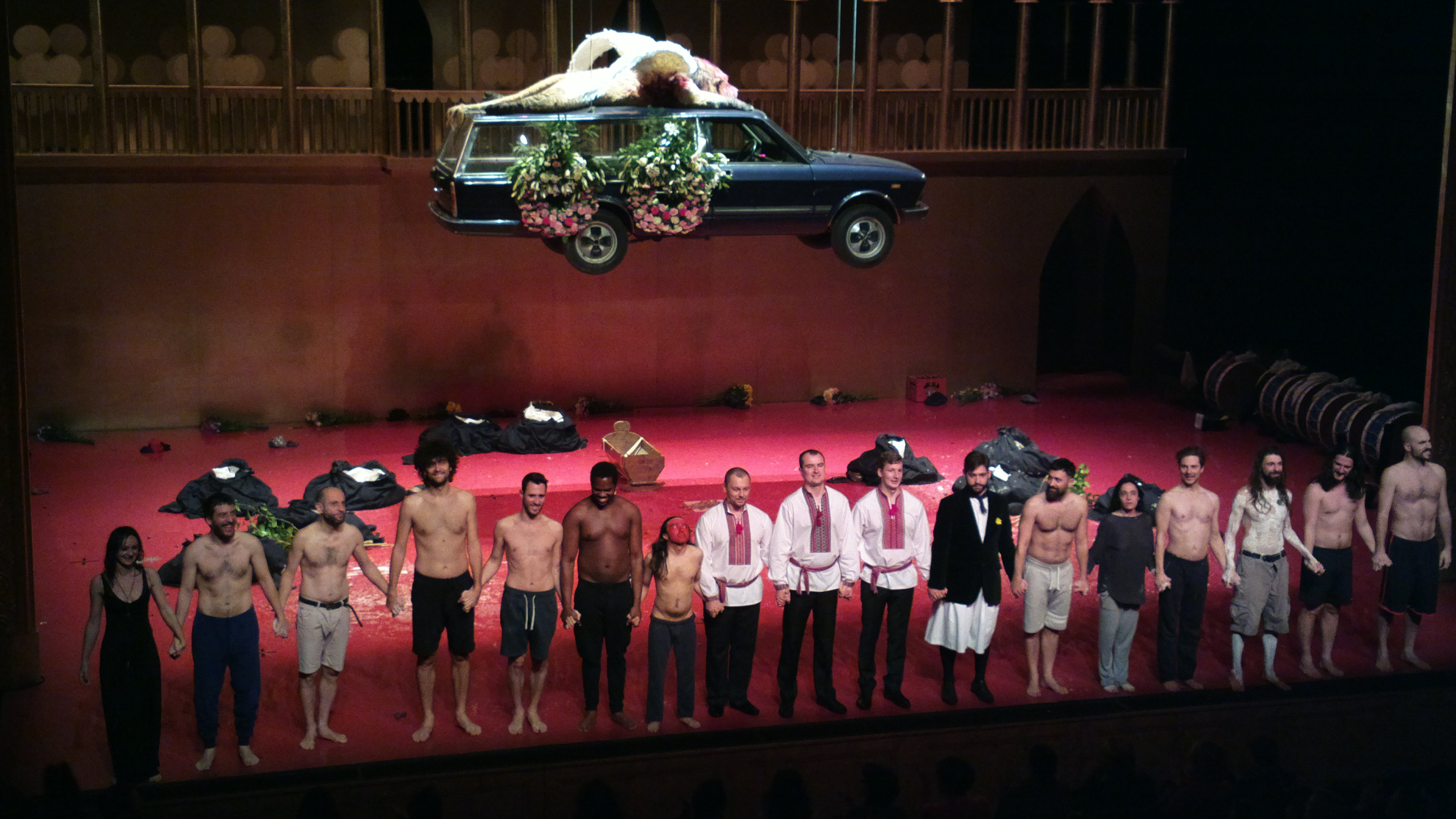 Angélica Liddell (1ère en partant de la gauche) dans You are my destiny (Lo stupro di Lucrezia) à Odéon-Théâtre de l’Europe